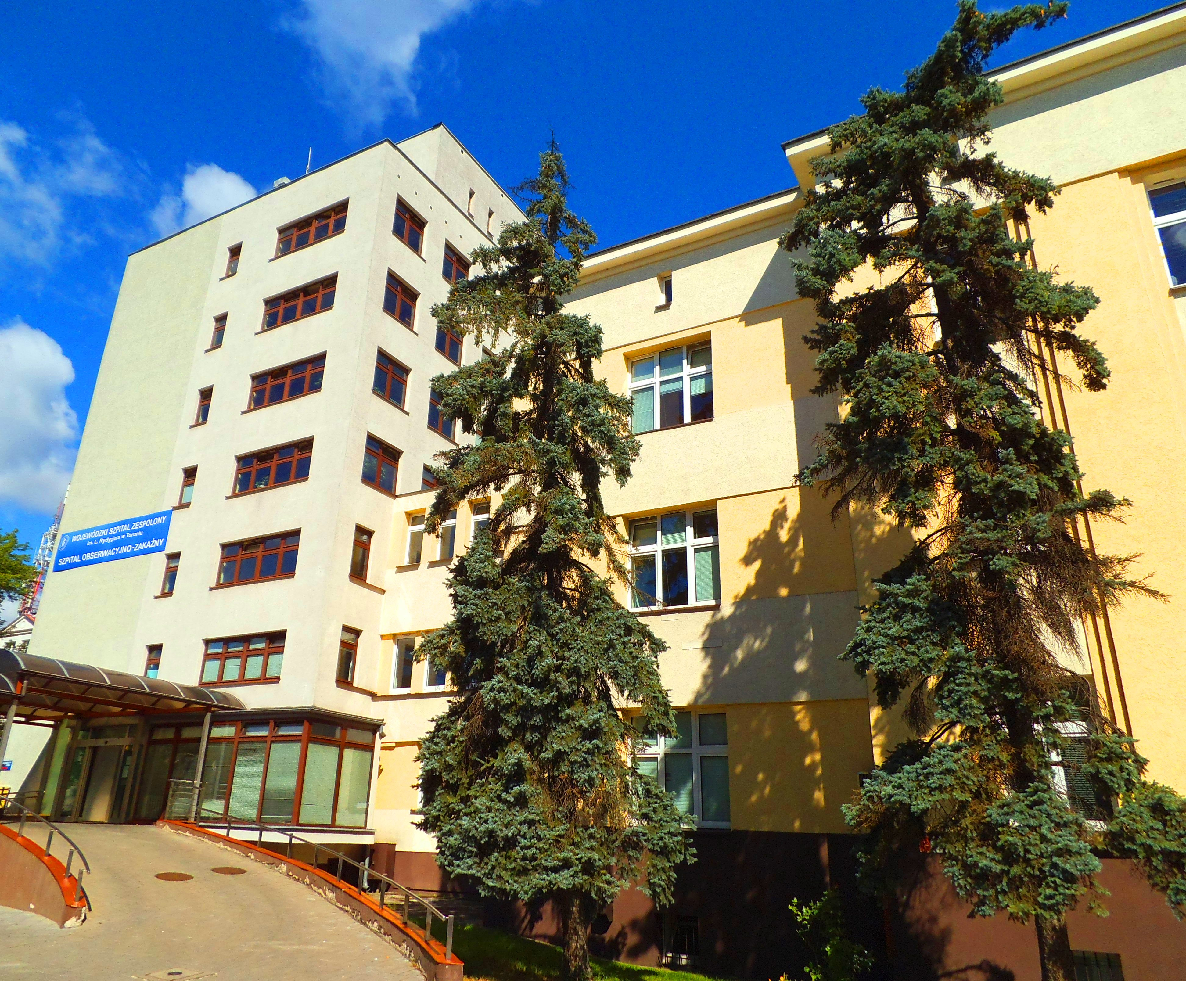 Szpital Zakaźny i przychodnia w Toruniu